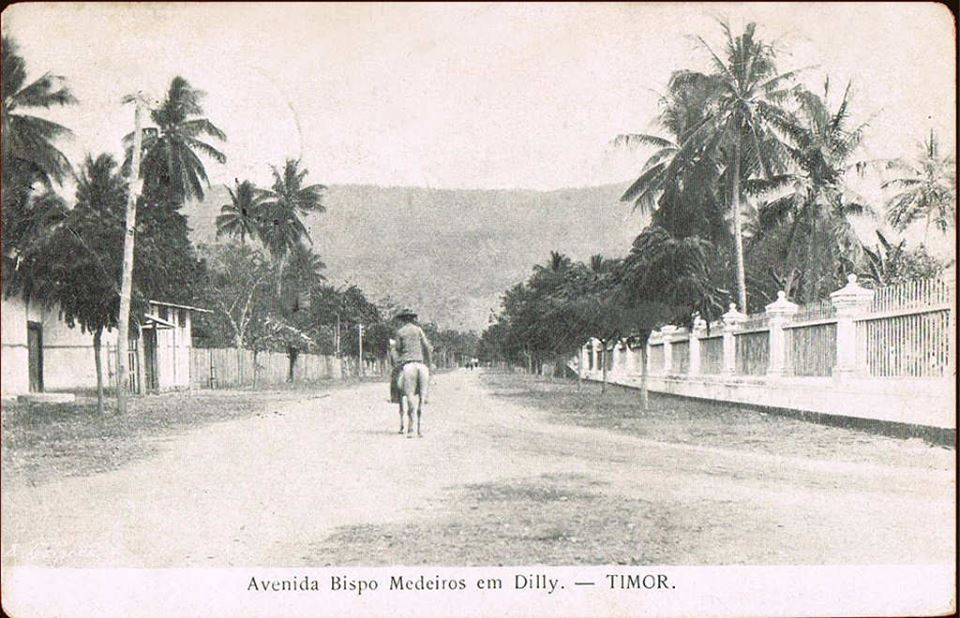 Postal de Timor Leste